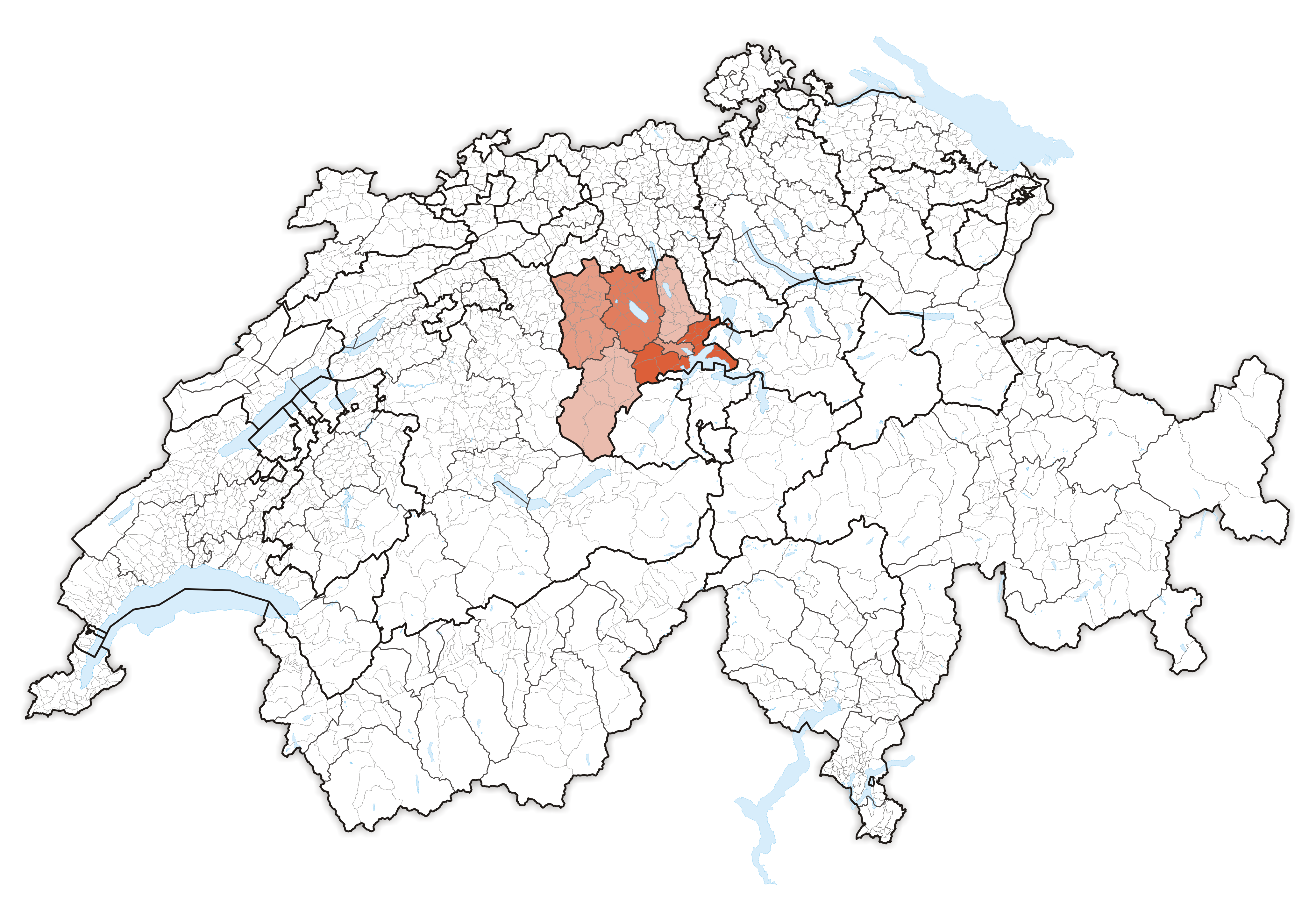 Canton Luzern